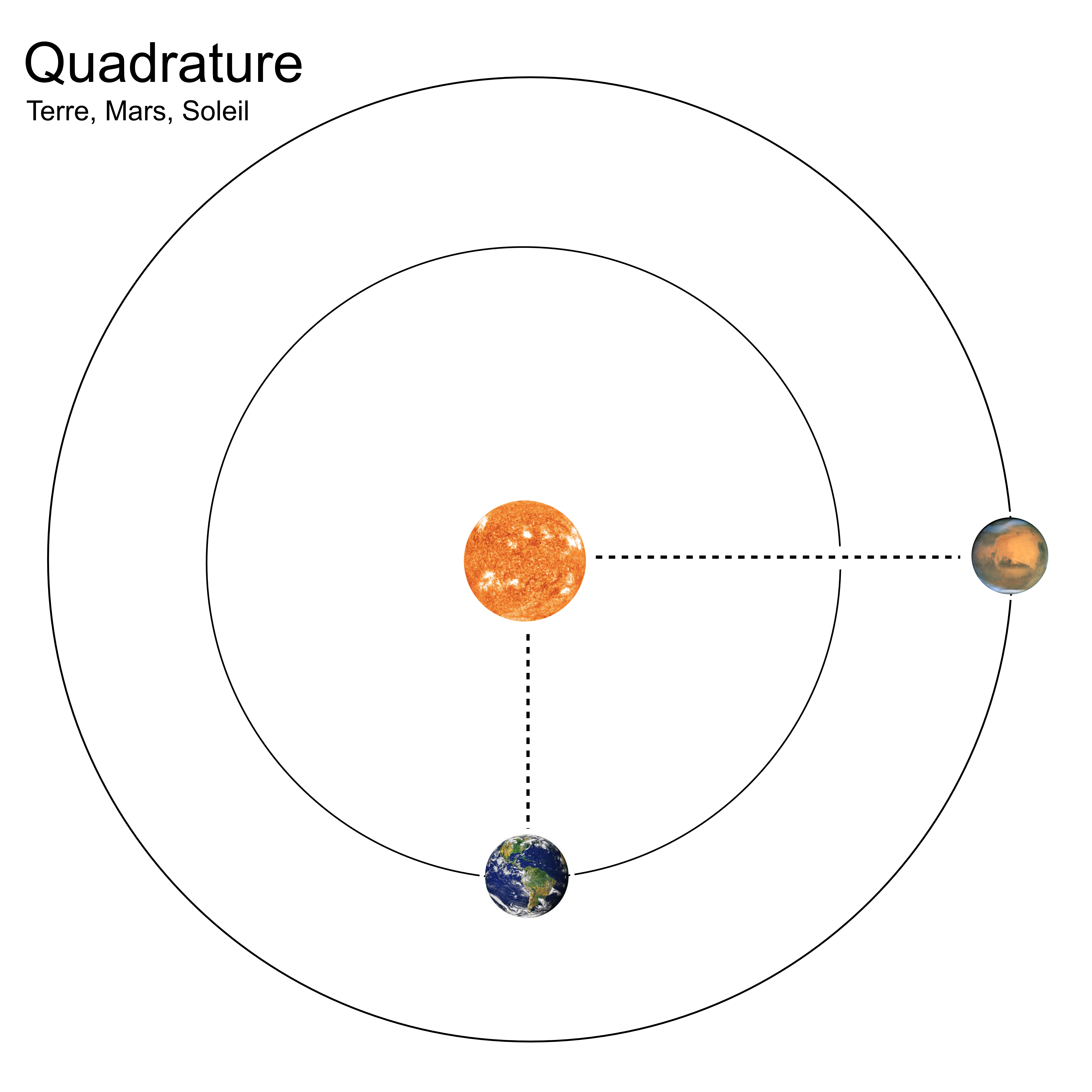 angle de 90° entre mars et la terre qui passe par le soleil